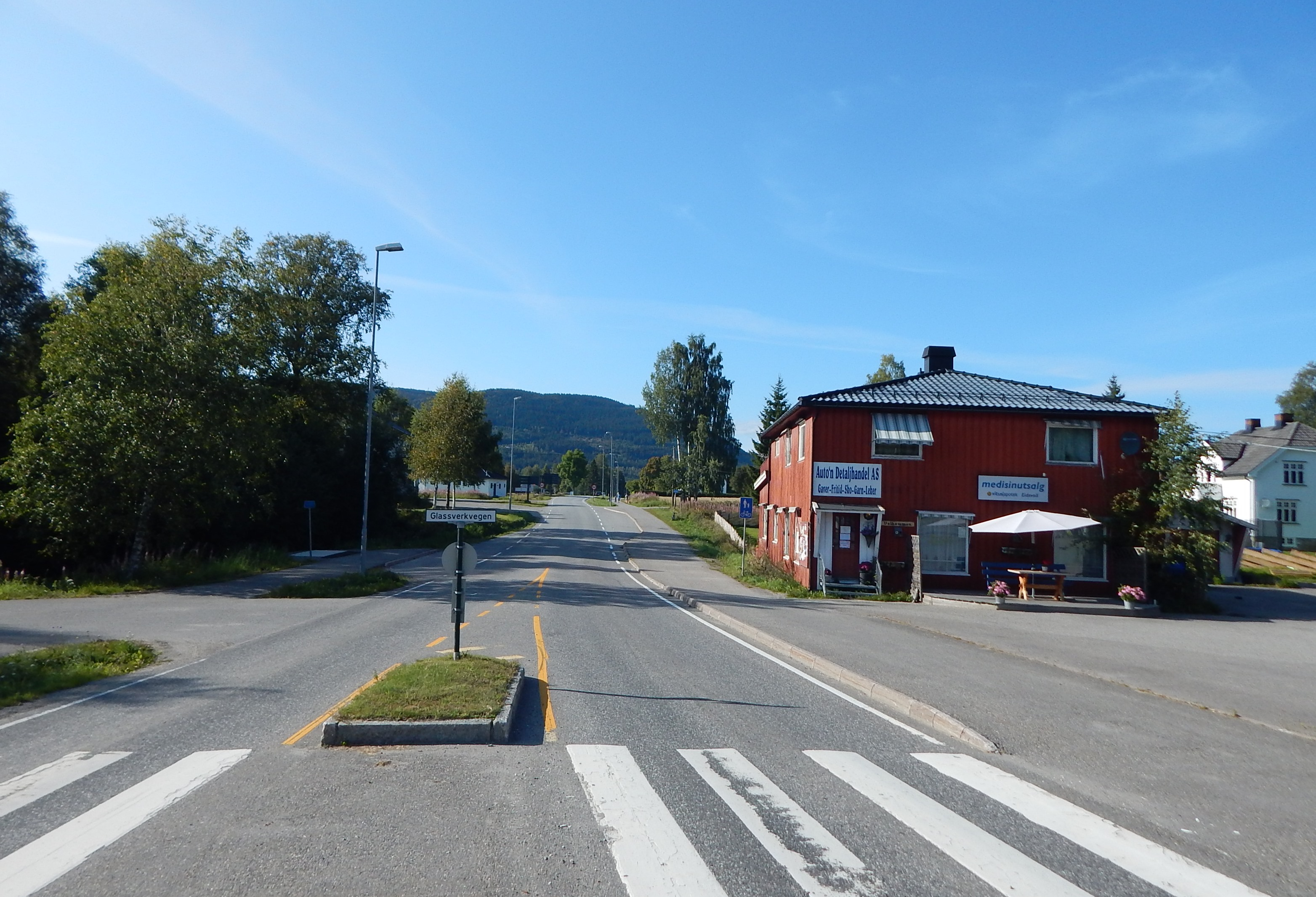 Glassverkvegen (fylkesvei 553) ved Torget i Hurdal